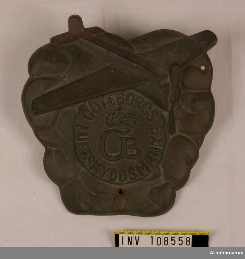 Plakett för fasad. Sitter på ett flertal fasader i Göteborg. På plaketten står det 'Göteborgs Luftskyddsmärke'. Ingår i Armémuseums samlingar. Identifikationsnummer: AM.108558